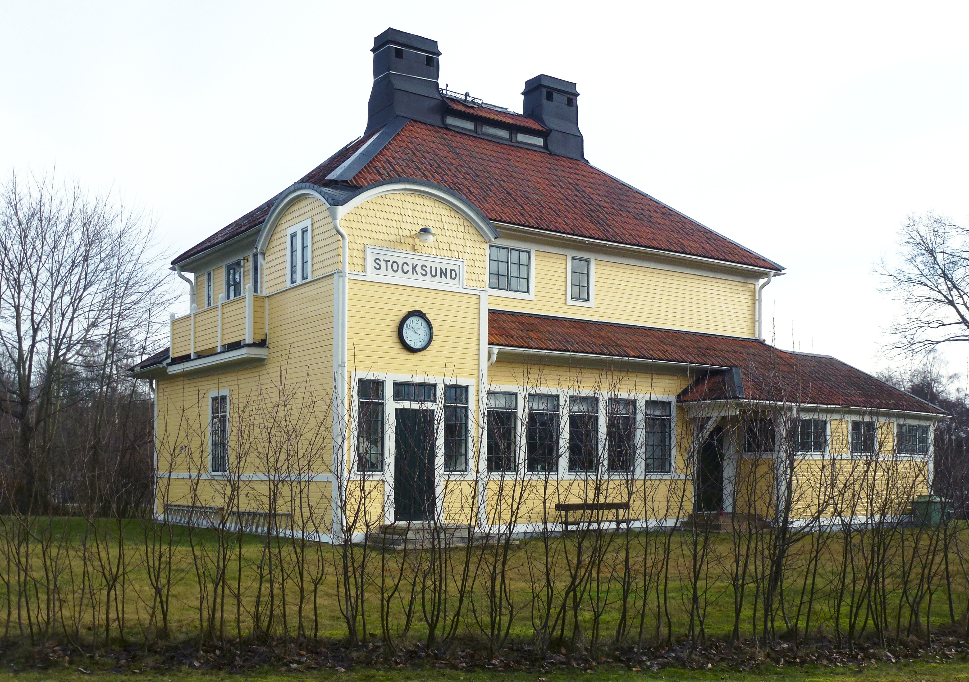 Stocksunds gamla stationshus, arkitekt Sigge Cronstedt